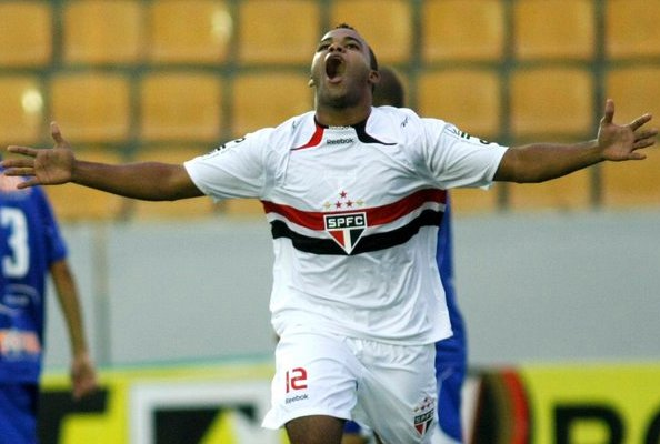 Comemoração gol Fernandinho - 2010